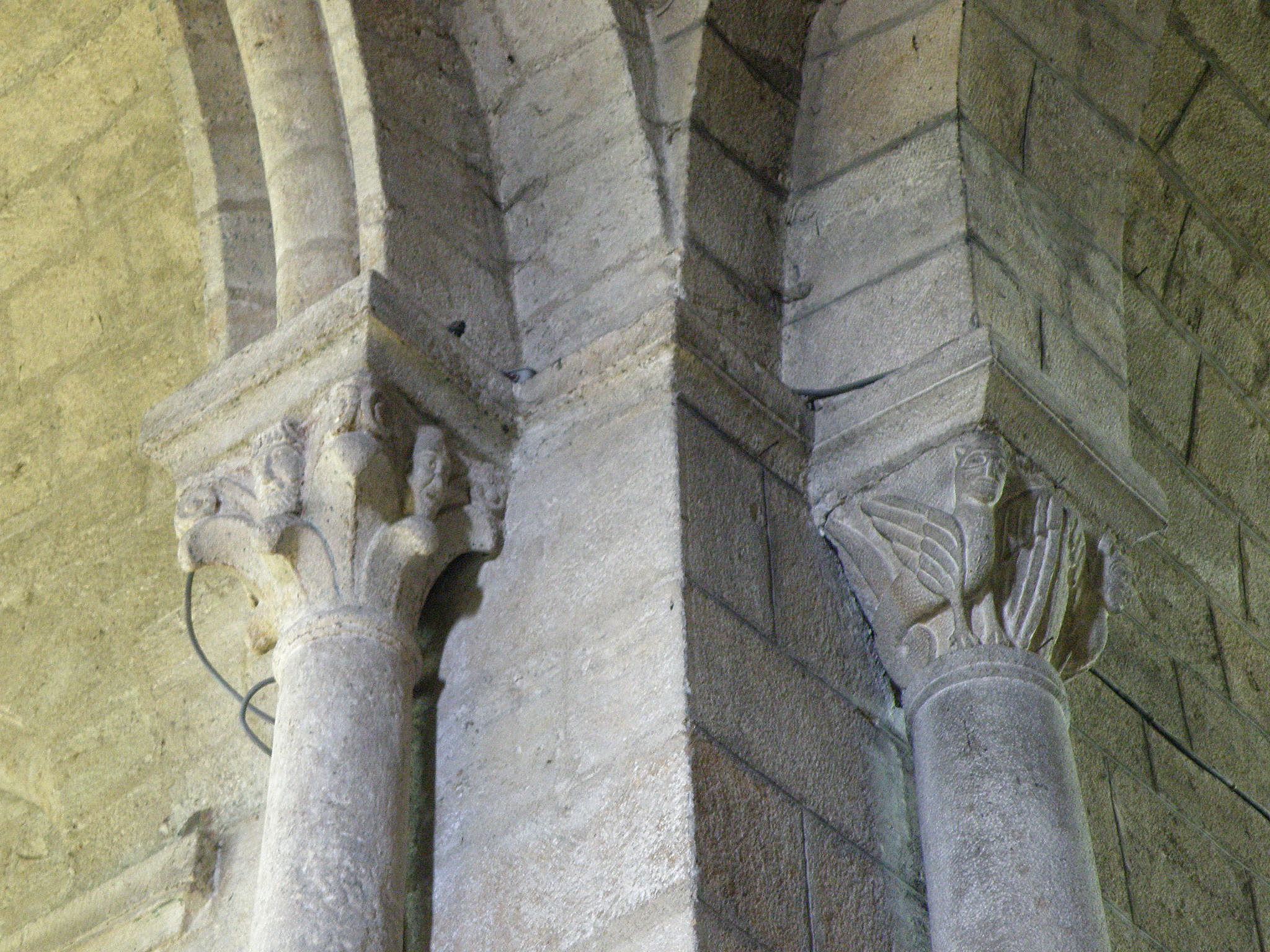 Saint-Julien-Chapteuil, comm. du dép. de la Haute-Loire, France (région Auvergne). Église Saint-Julien, chapiteaux de la nef.